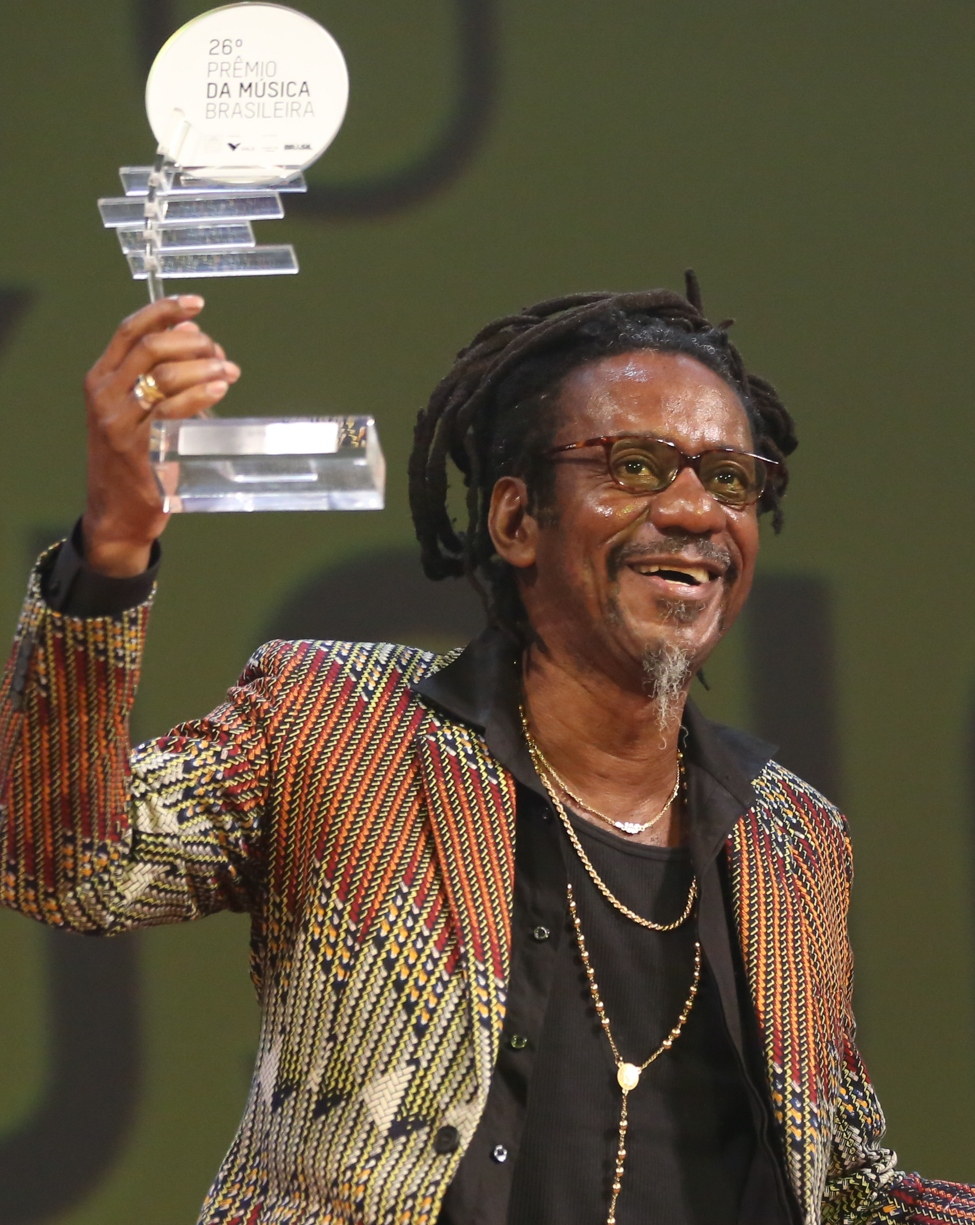 Prêmio MPB / Melhor Cantor - Luiz Melodia - 26° Prêmio da Música Brasileira 2015, no Theatro Municipal, no Centro do Rio de Janeiro/RJ. (10/06/15) Foto: Roberto Filho/Divulgacão